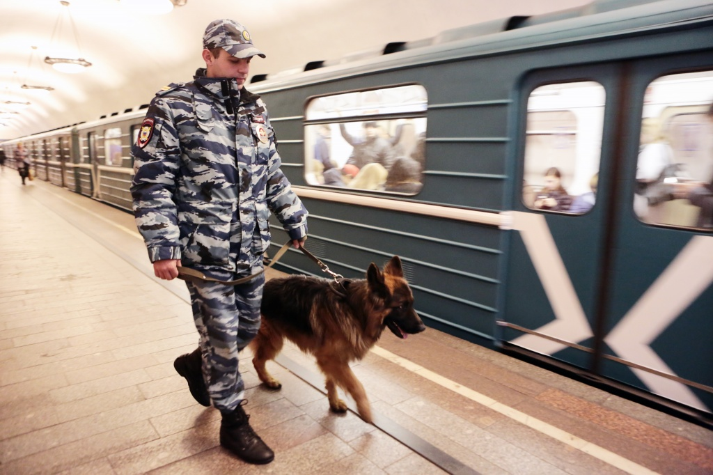 Кинолог с собакой в Московском метро